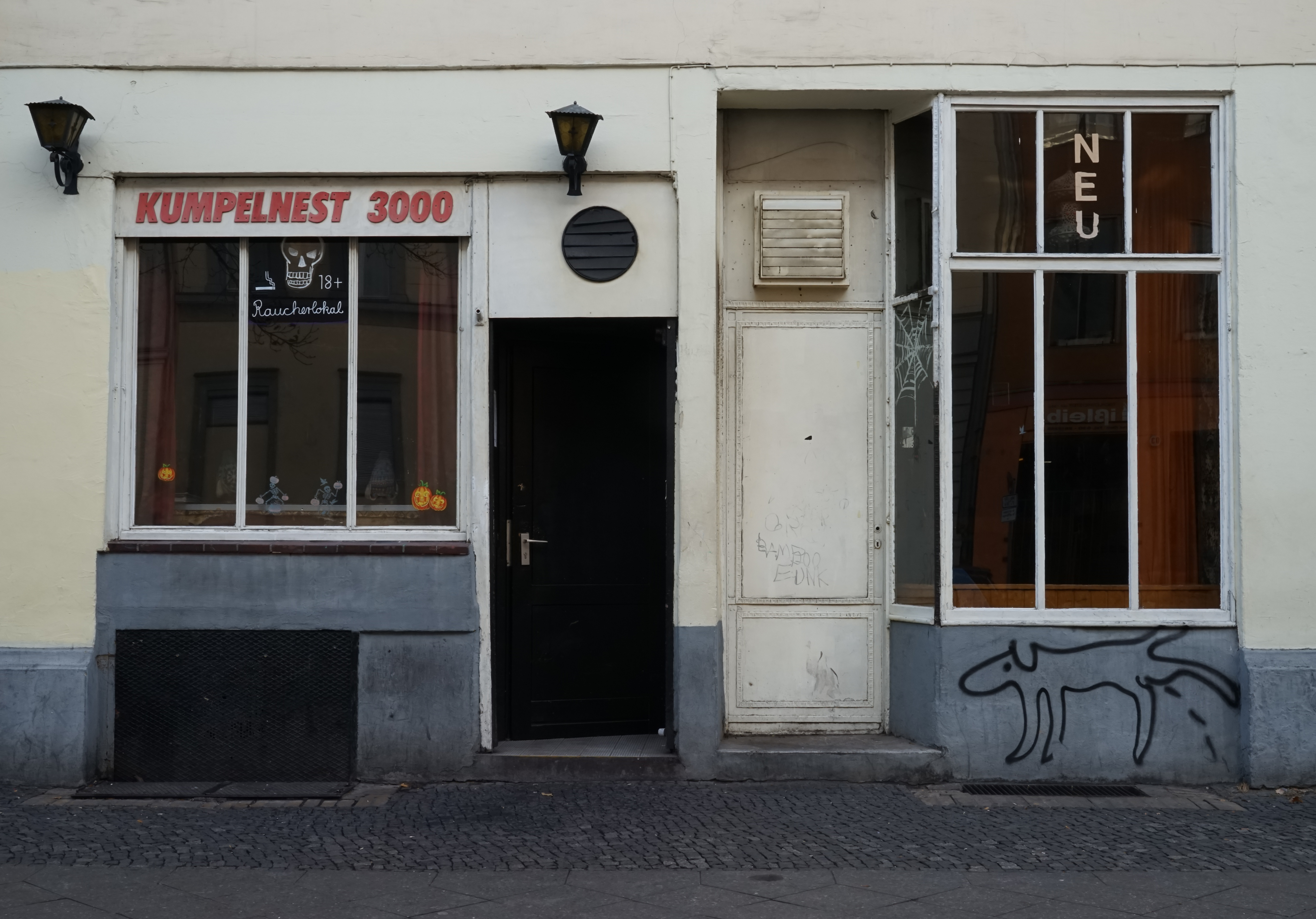 Das "Kumpelnest 3000" in Berlin-Schöneberg